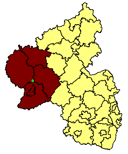 Rheinland-Pfalz -Lage des ehemaligen Regierungsbezirk Trier - Lage der Fidei